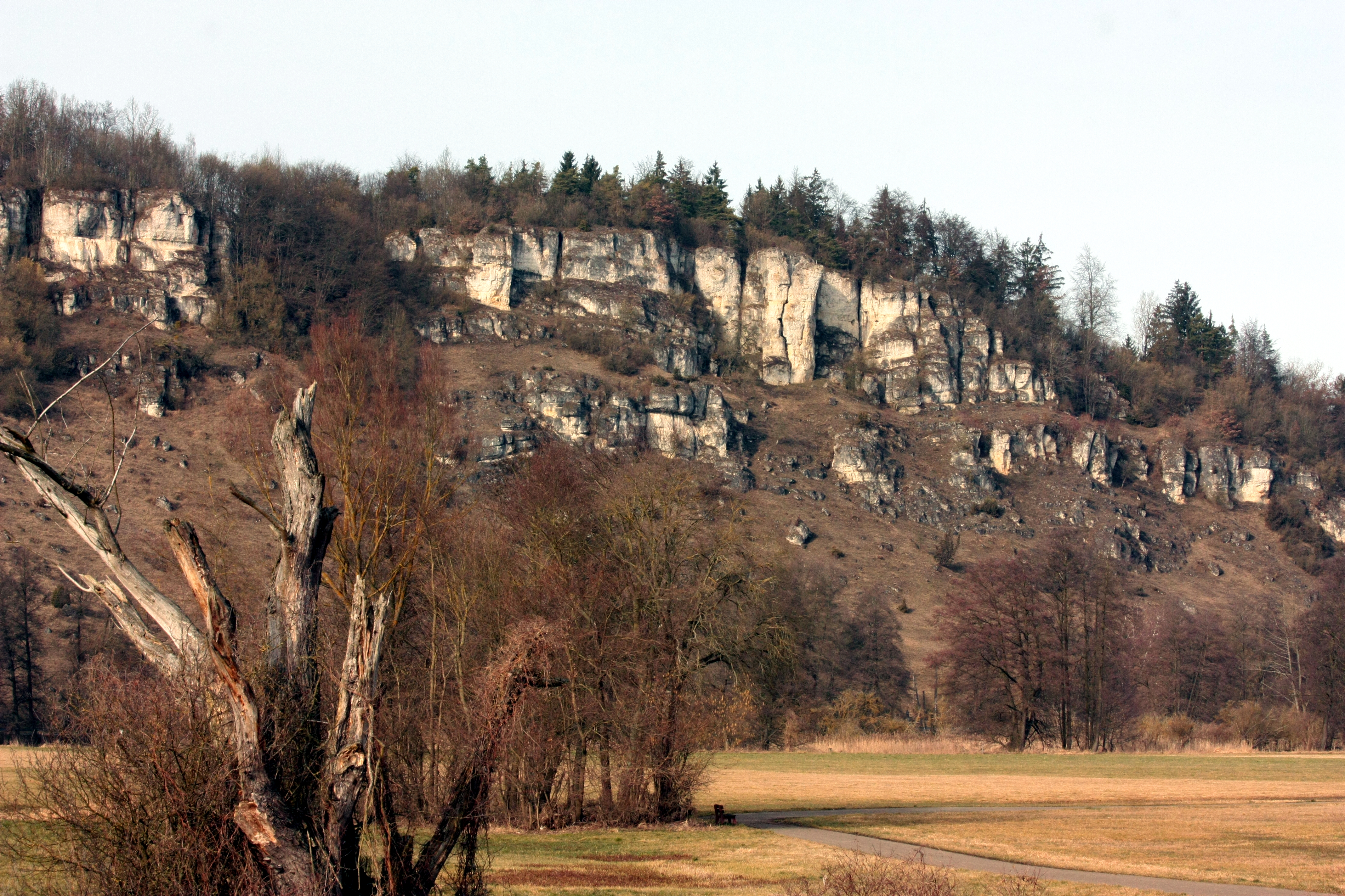 (NSG:BY-NSG-00230.01)_Eichenberg